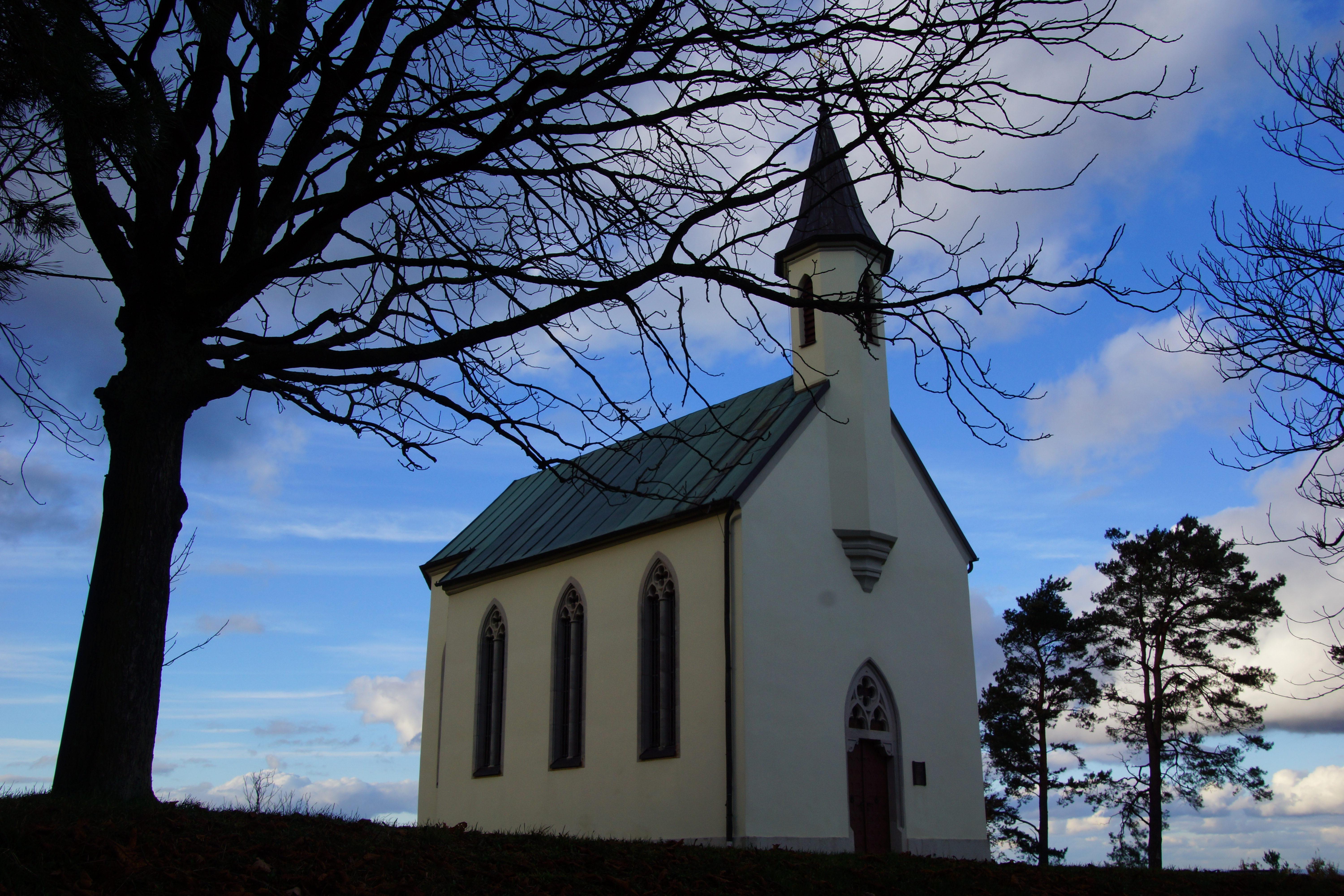 Das Wallfahrtskirchlein zu den 14 Nothelfern am Möninger Berg